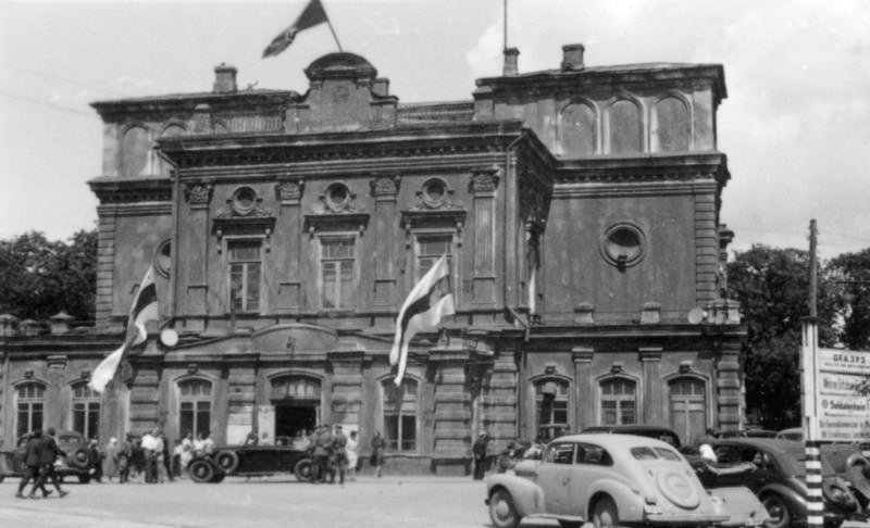 Juni 1943 Film 90/33 Foto: Dr. Maier Information added by Wikimedia users.Беларуская (тарашкевіца): Белдзярждрамтэатар (цяпер — Нацыянальны тэатар імя Янкі Купалы). Менск, БССР. Чэрвень 1943 году.